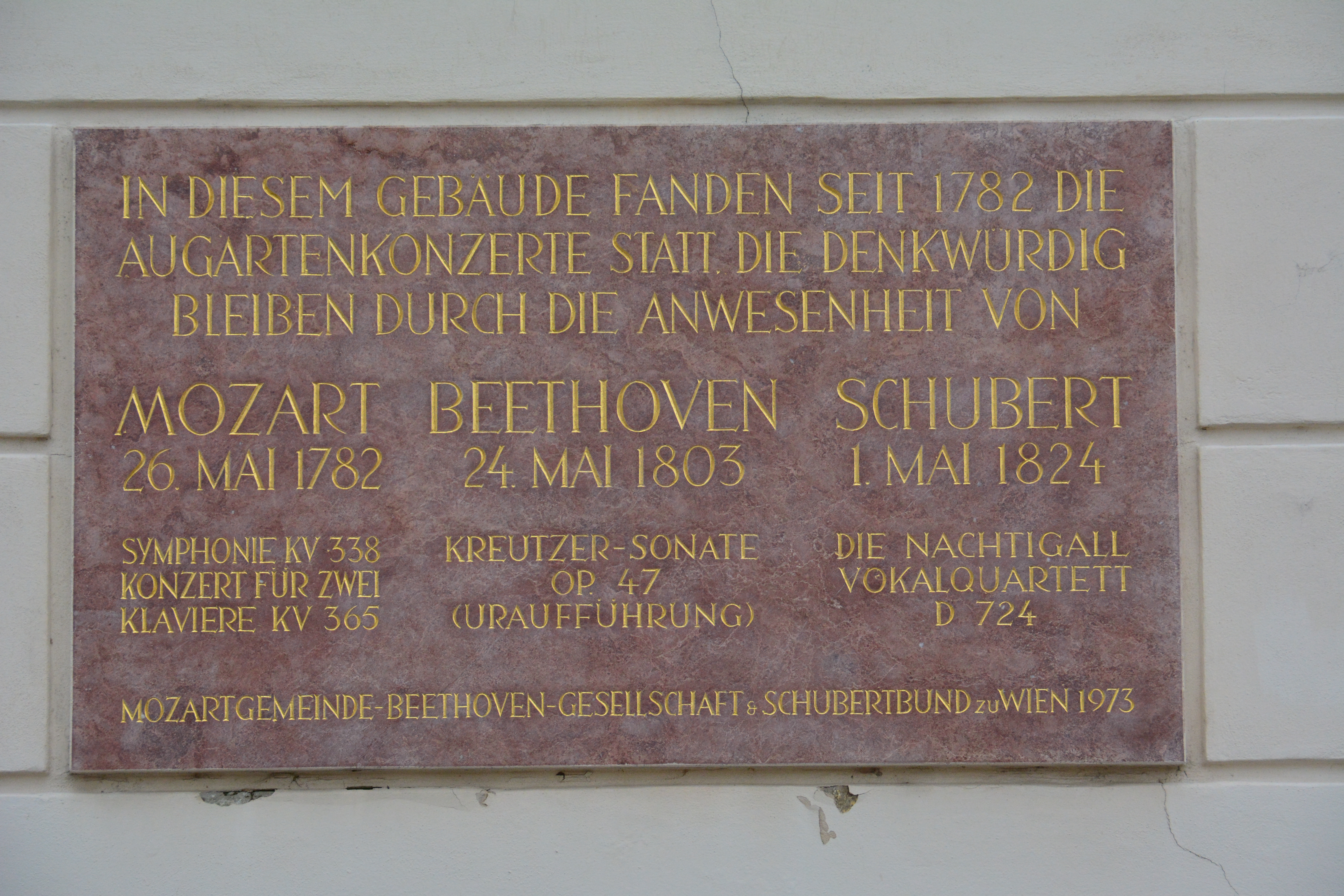 Gedenktafel für die Augartenkonzerte (Wien, Obere Augartenstraße 1, Augarten, Cafe Augarten)